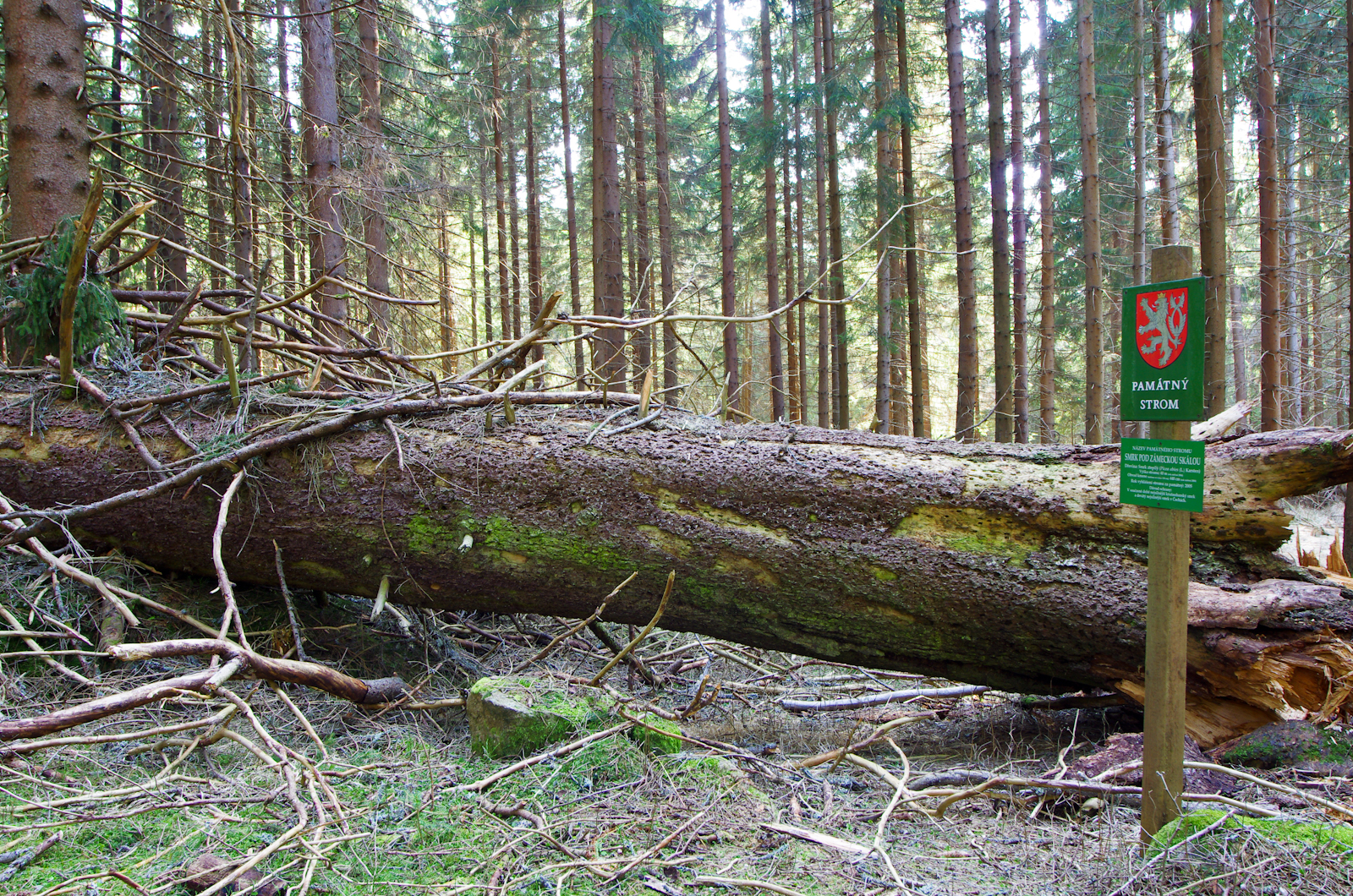 Šindelová, památný strom - smrk pod zámeckou skálou, Krušné hory